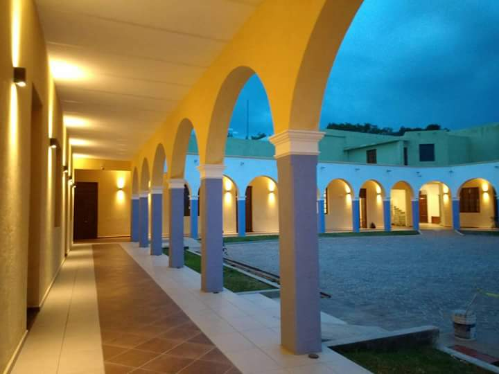 Museo de Purísima del Rincón Guanajuato